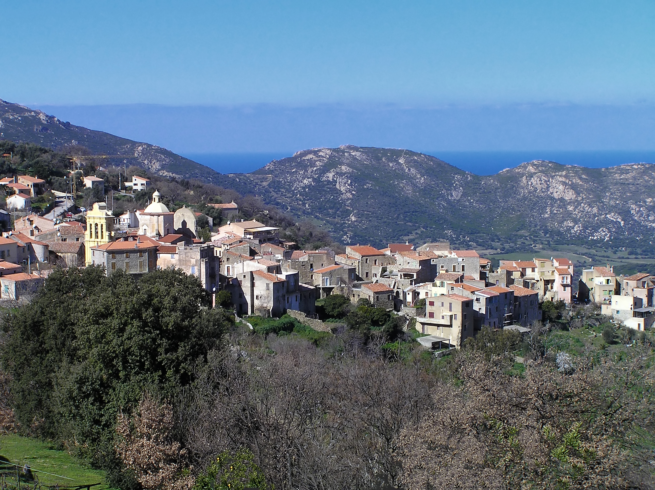 Cateri - Le village